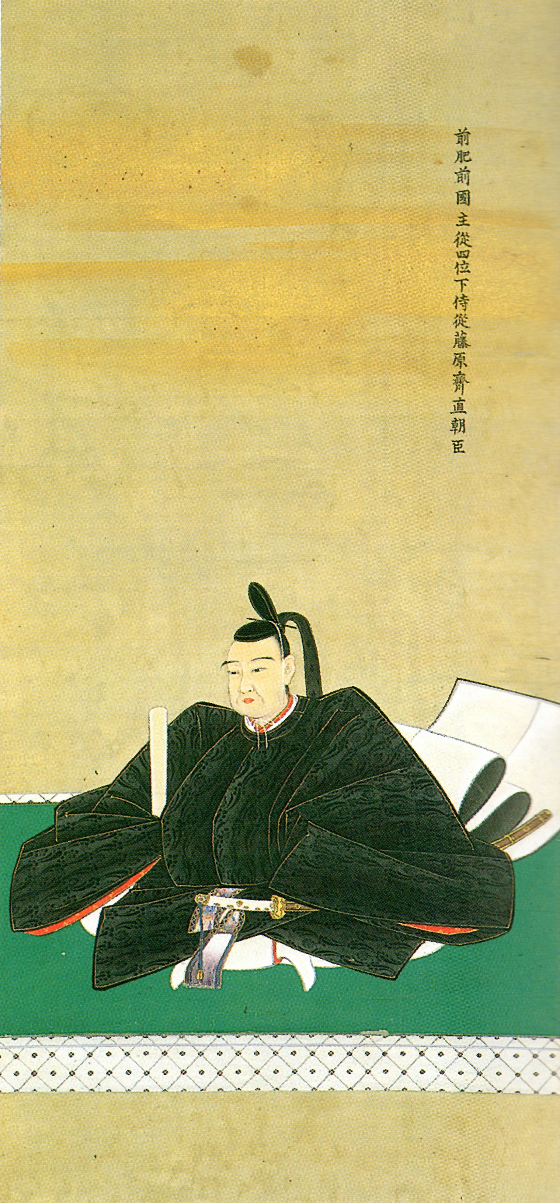 鍋島斉直の肖像。